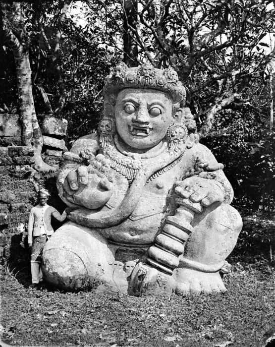 Negatief. Beeld van een demonische tempelwachter, Singosari, Oost-Java